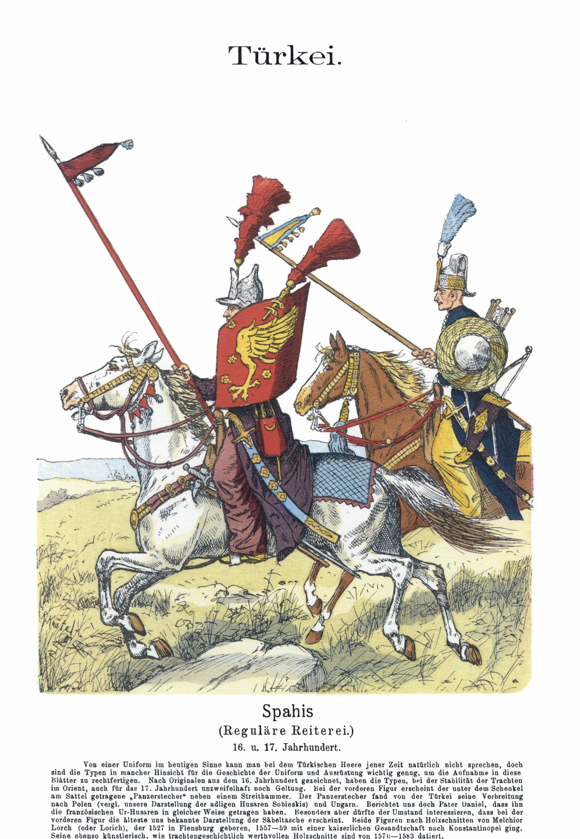 Uniformenkunde von Richard Knötel